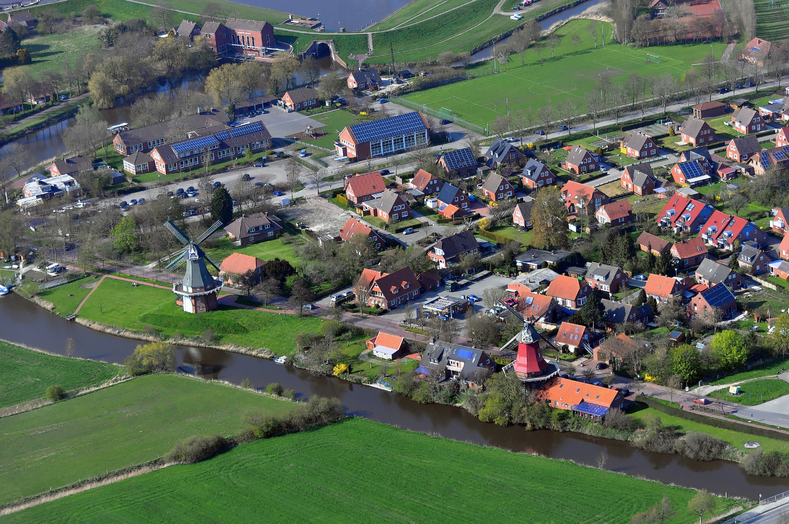 Luftbilder von der Nordseeküste 2013-05